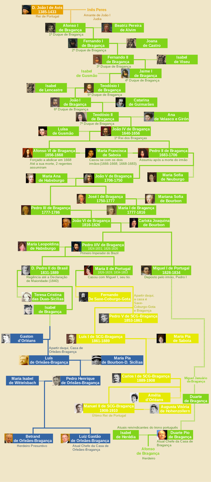 Este gráfico apresenta todos os chefes da casa de Bragança, até mesmo das casas descendentes.